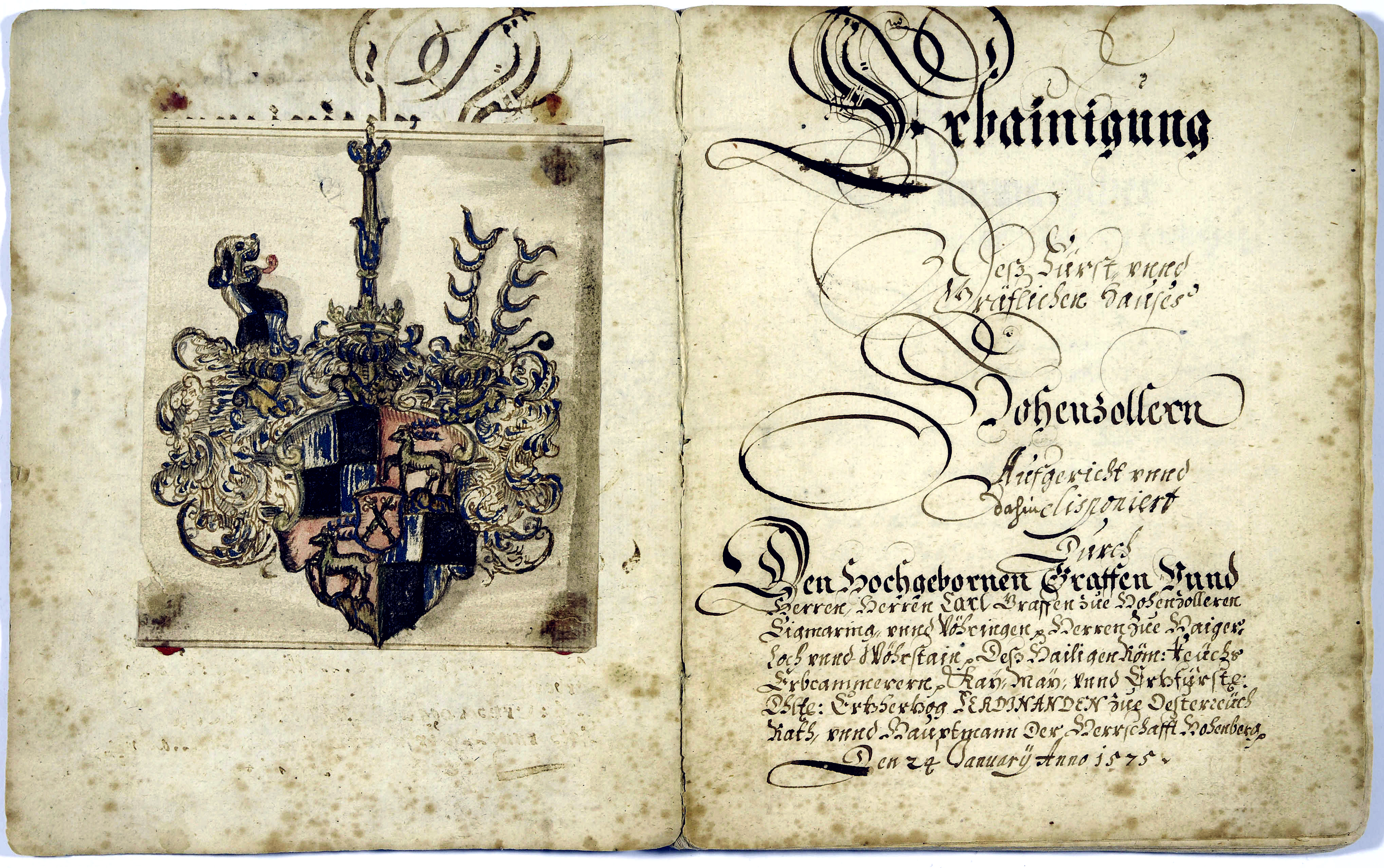 Erbeinigung der Grafen von Hohenzollern, Abschrift des Originals von 1575 (StAS FAS HH 1-50 T1-5 U 276)